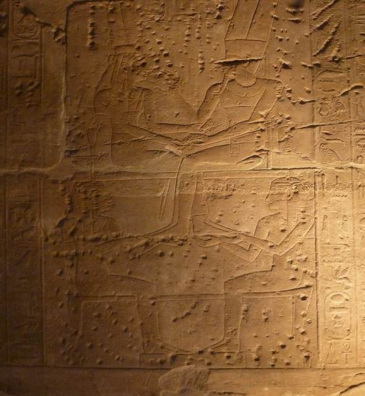 Visite du dieu Amon à la mère du futur Amenhotep III. Temple de Louksor. XVIIIe dynastie.